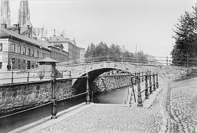 Nybron i Uppsala någon gång före 1899.